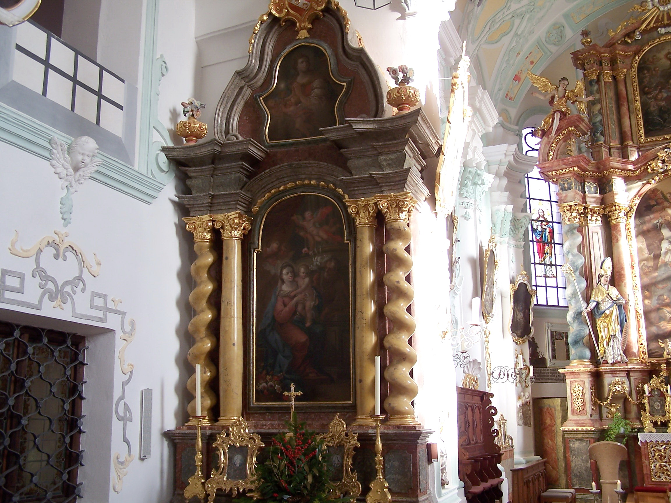 Wildenberg, Pürkwang, Am Kirchberg 9. Katholische Pfarrkirche St. Andreas. Pfarrkirche St. Andreas Pürkwang. Nördlicher Seitenaltar mit einem geraden und einem gewundenen Säulenpaar. Das Hauptbild zeigt die Heilige Familie.